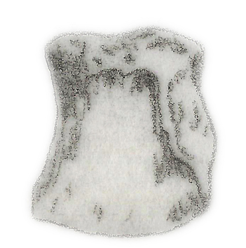 Illustration of a fossil of Tichosteus